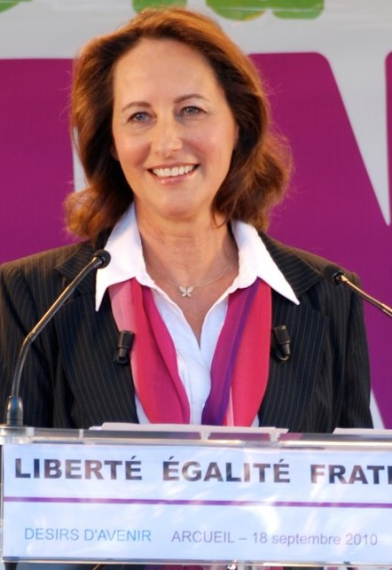 Ségolène Royal lors de la 3ème édition de la fête de la Fraternité à Arcueil, le samedi 18 septembre 2010.